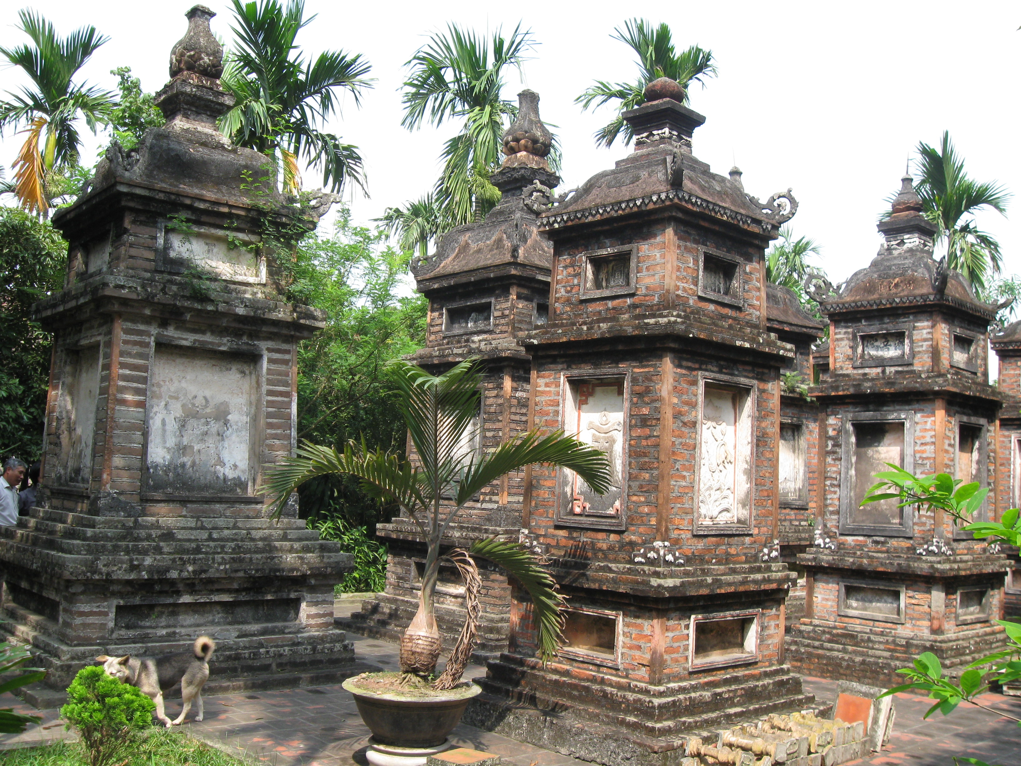 Hình tự chụp bởi Bigland